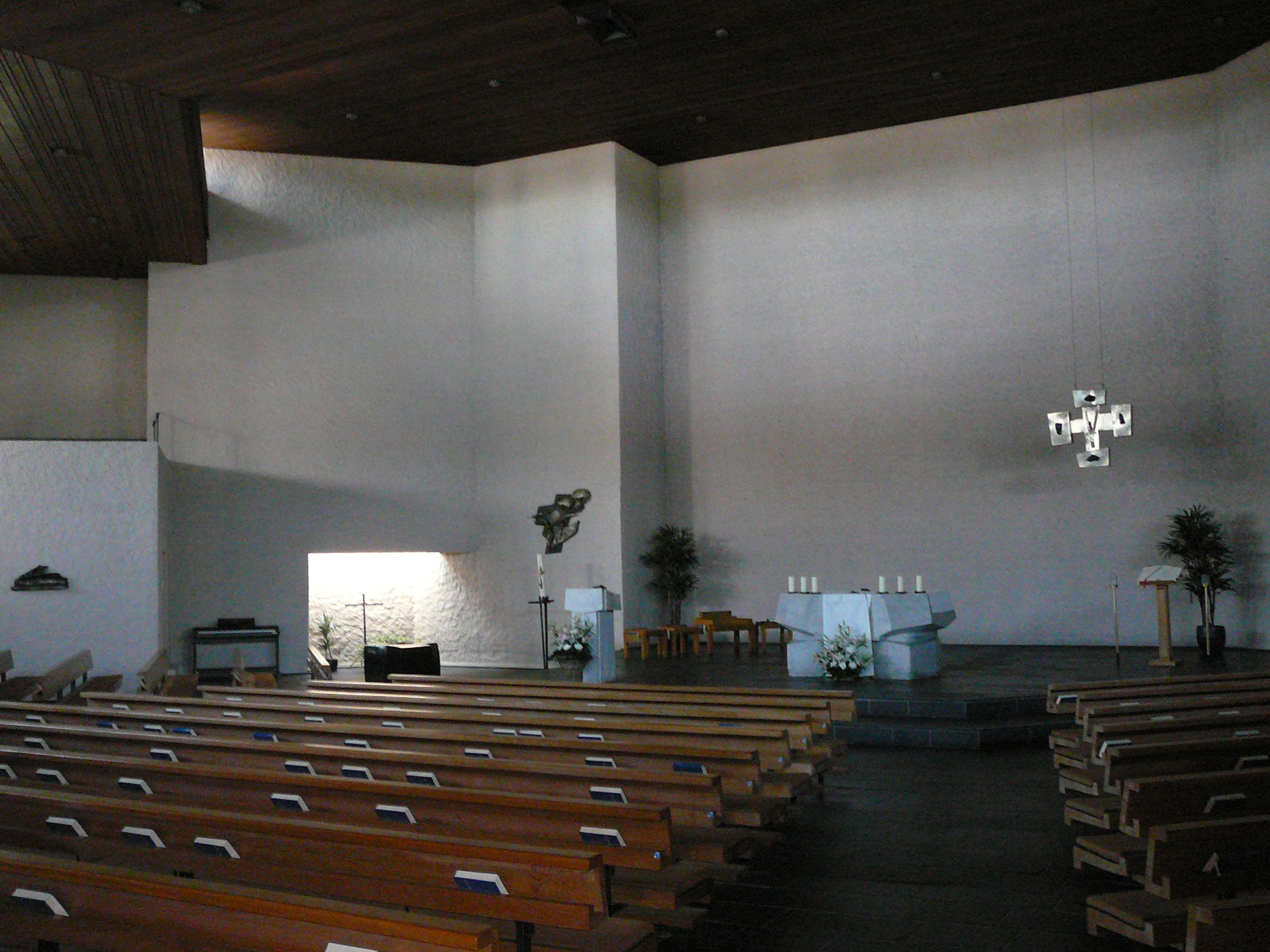 Römisch-katholische Pfarrkirche St. Michael Zollikerberg, Innenraum